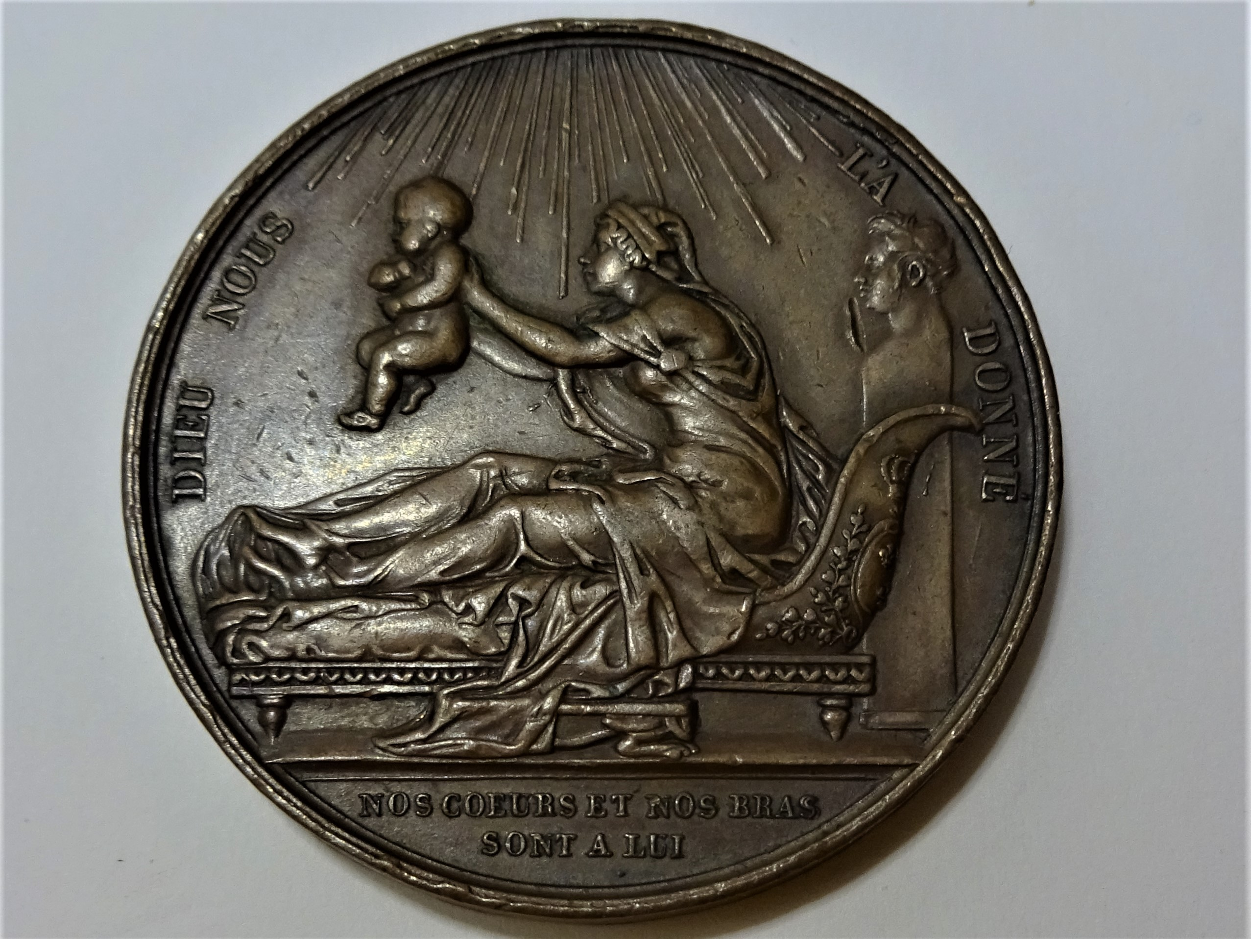 Medaillenvorderseite Henri in den Armen seiner Mutter, eine Büste seines Vaters dahinter